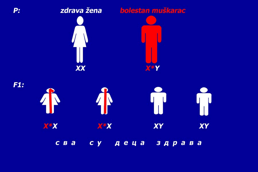 Аутор: Снежана Трифуновић